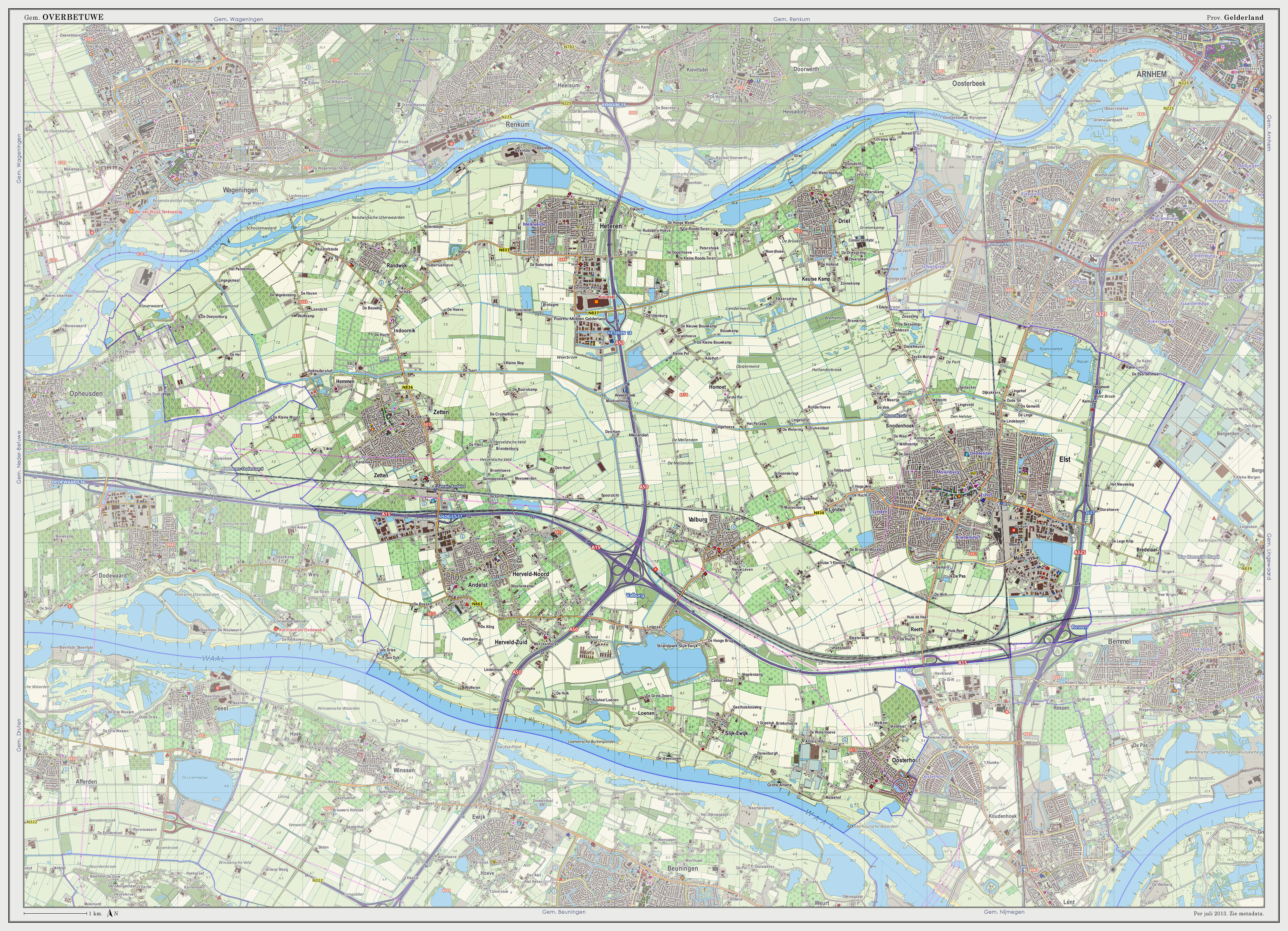 Topografische kaart van gemeente Overbetuwe (2013). Samengesteld door Jan-Willem van Aalst op basis van de GML open geodata van de BRT/Top10NL (basisregistratie Topografie, Kadaster 2011), vrijgegeven door Kadaster onder de Creative Commons BY licentie. Additionele gegevens uit BAG (8 juli 2013), uit de Open Street Map (9 juli 2013) en uit de Risicokaart. Peildatum kaartbeeld: 9 juli 2013. Zie ook Gemeentenatlas.nl Samenstelling en kleurenschema: Jan-Willem van Aalst, met QuantumGIS en Photoshop. Zie ook de Legenda.